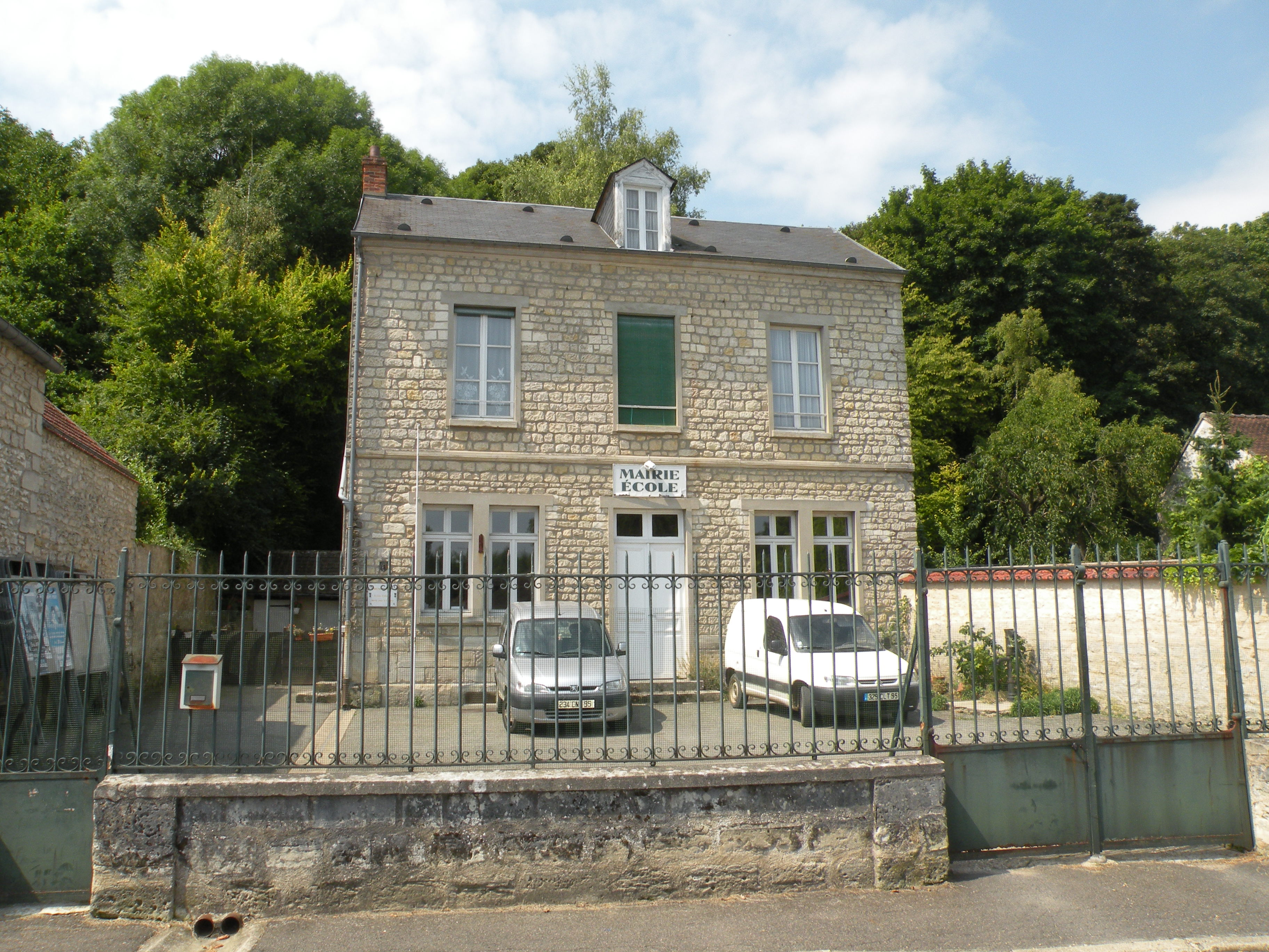 mairie de Menouville, val d'oise france